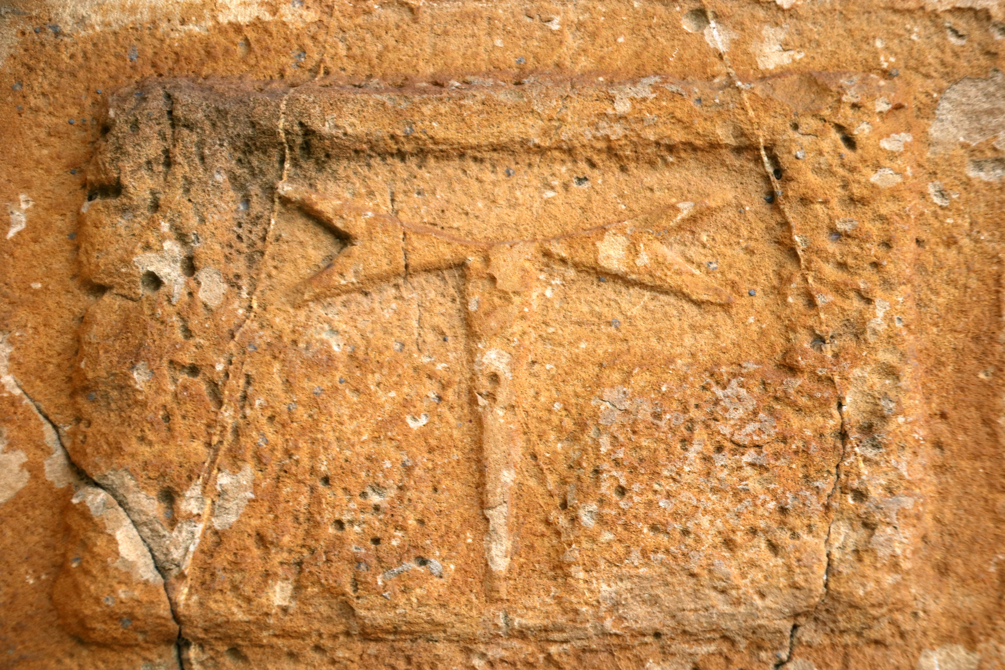 Campanile della chiesa dei Santi Jacopo, Cristoforo ed Eligio (Altopascio)